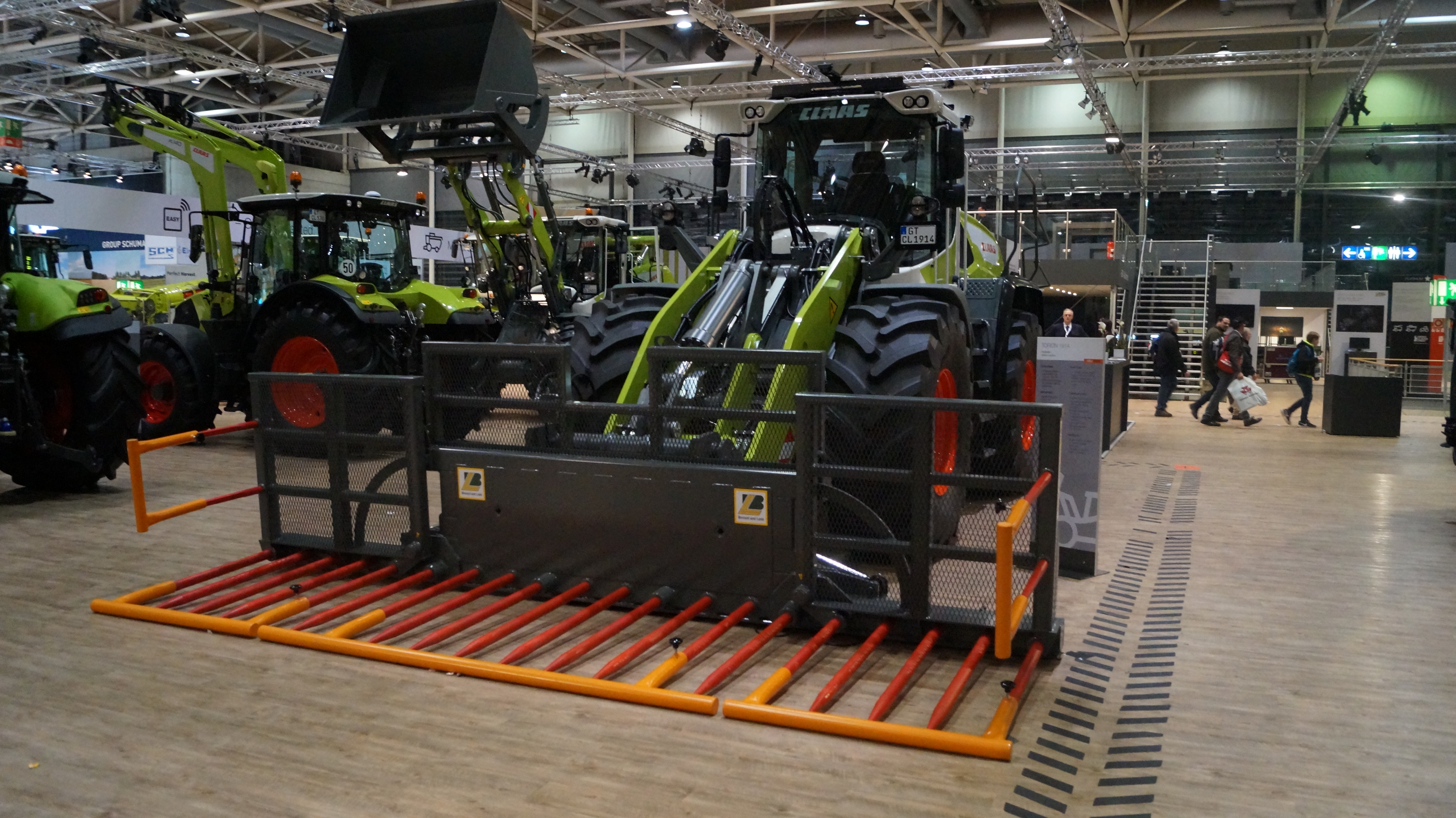 Frontansicht eines Claas Torion 1914, ausgestellt auf der Agritechnica 2017.